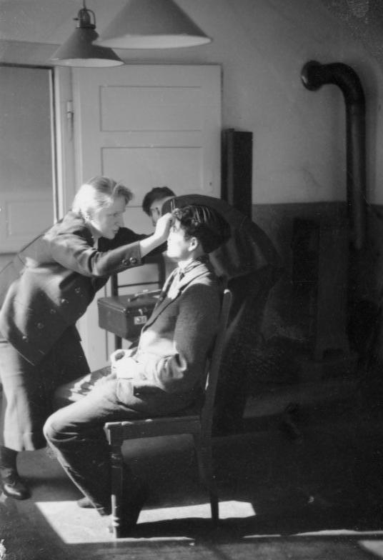 Stuttgart Kripo IV 1938